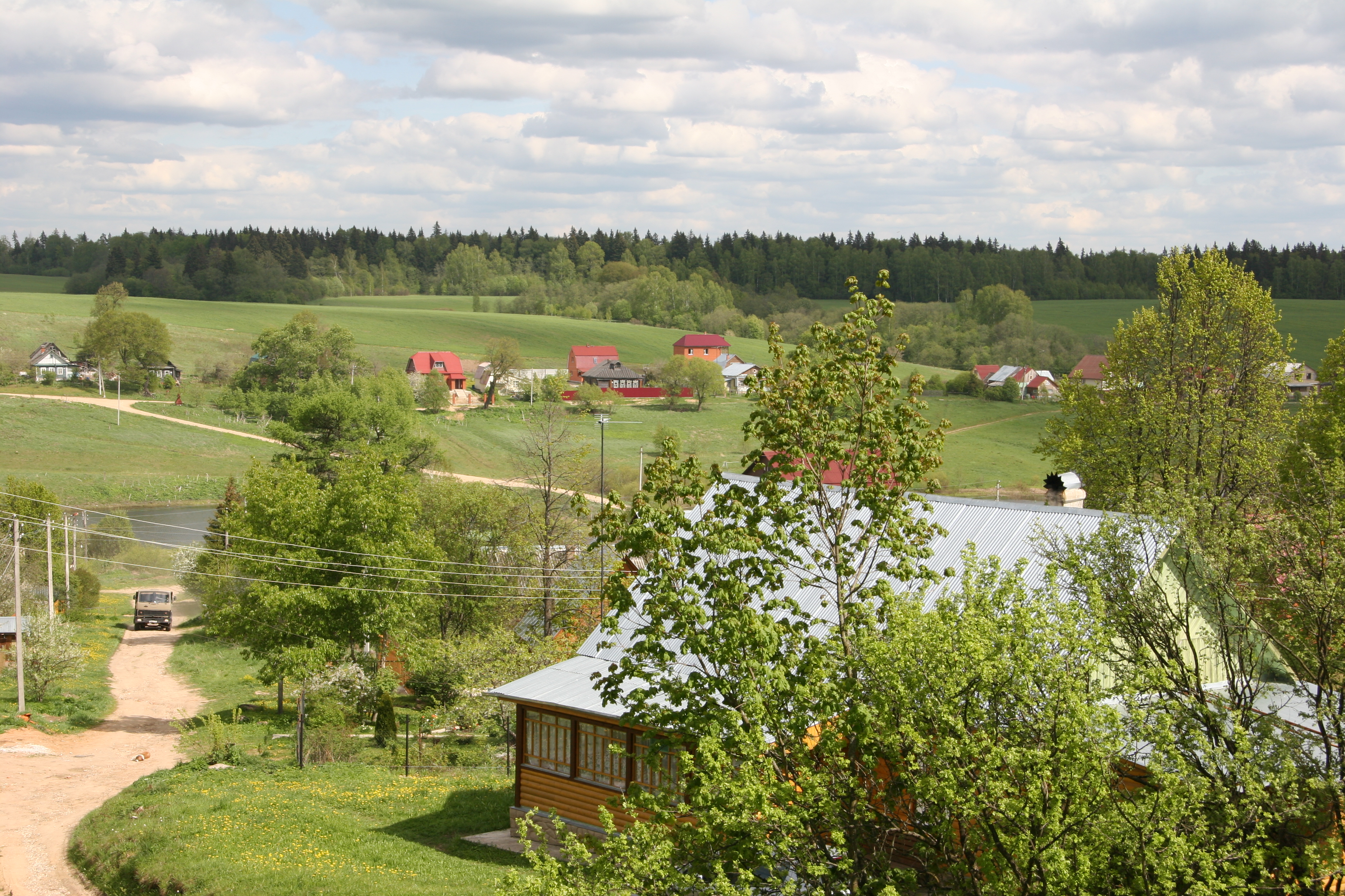 Annino, Moskovskaya oblast', Russia, 143123